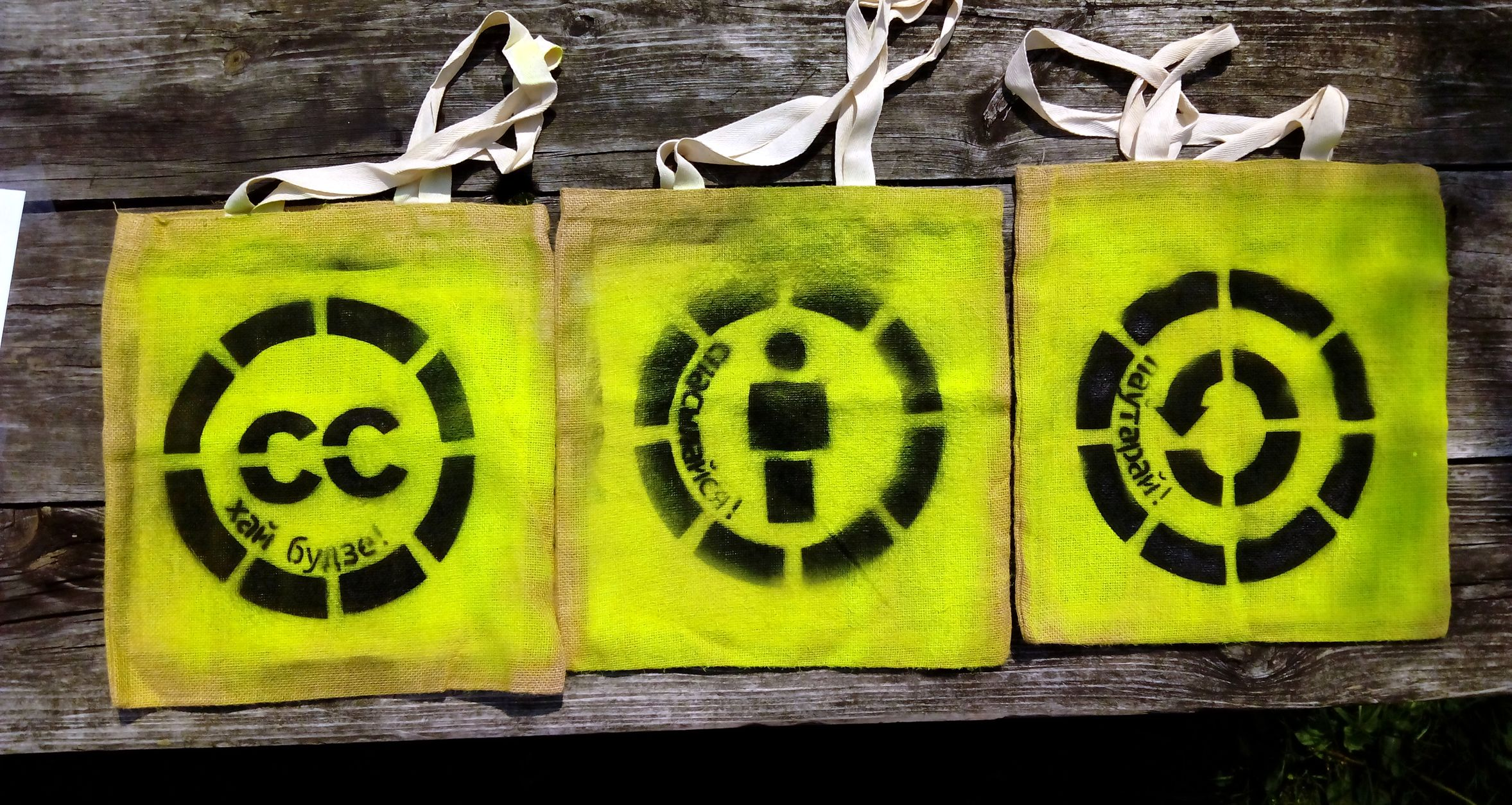 Ліцэнзія Creative Commons Attribution Share-Alike выкладзеная з торбачак